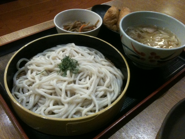 熊谷うどんと妻沼おいなり